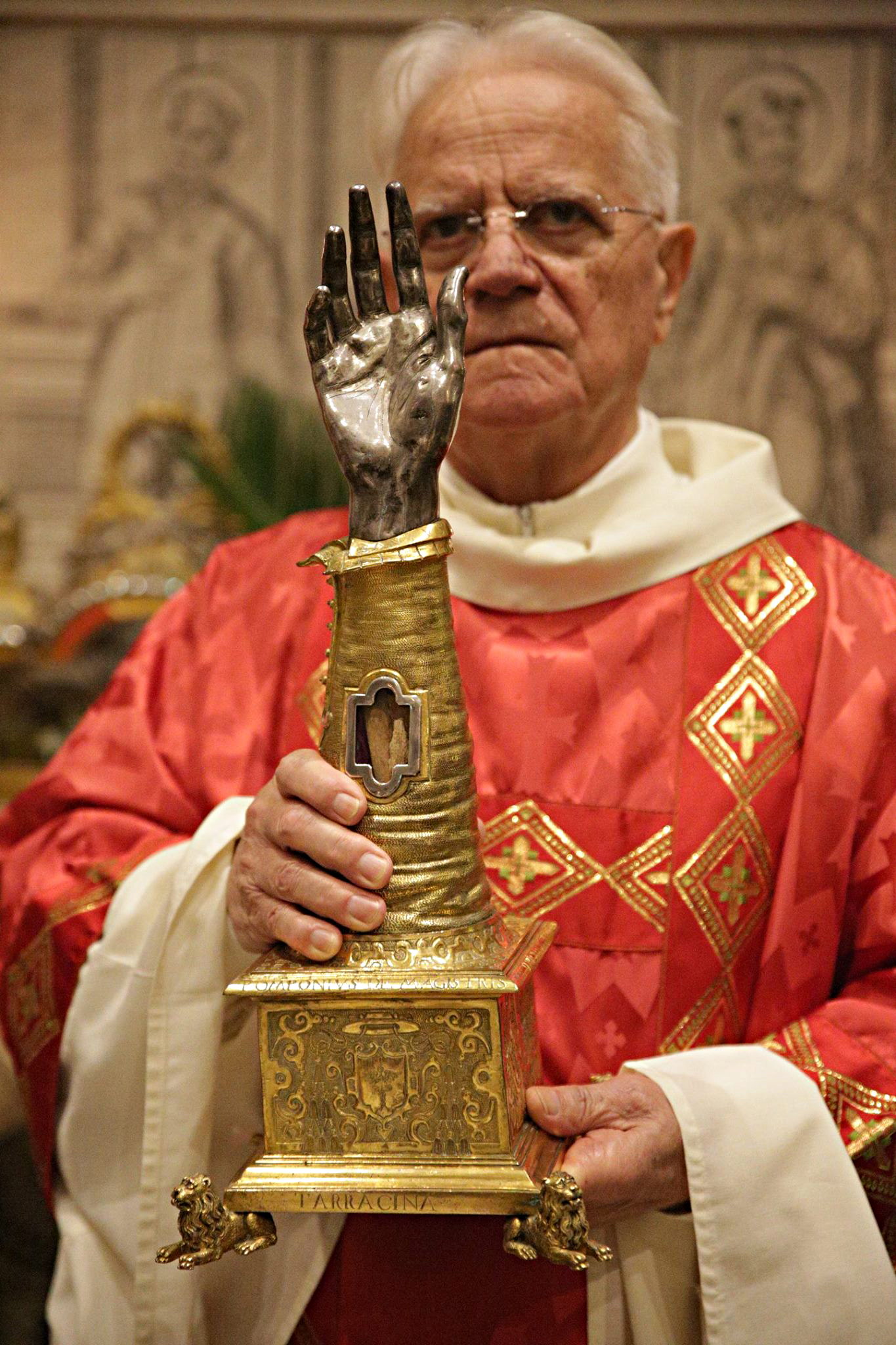 Il braccio reliquiario di San Cesareo, Cattedrale di Terracina (Foto di Andrea Longo)